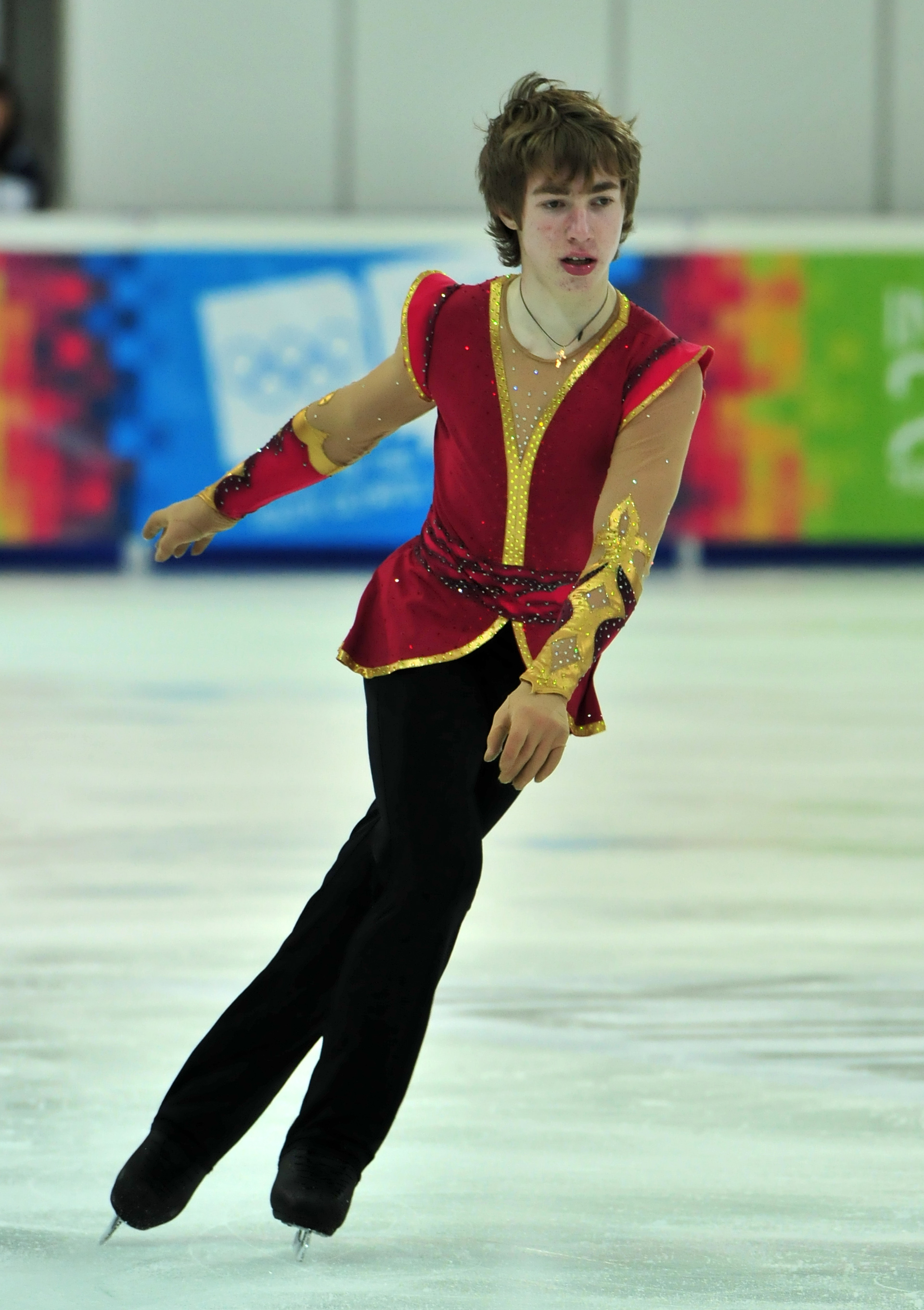 1. Jugendolympiade 2012 Innsbruck; Feodossi Jefremenkow (RUS)